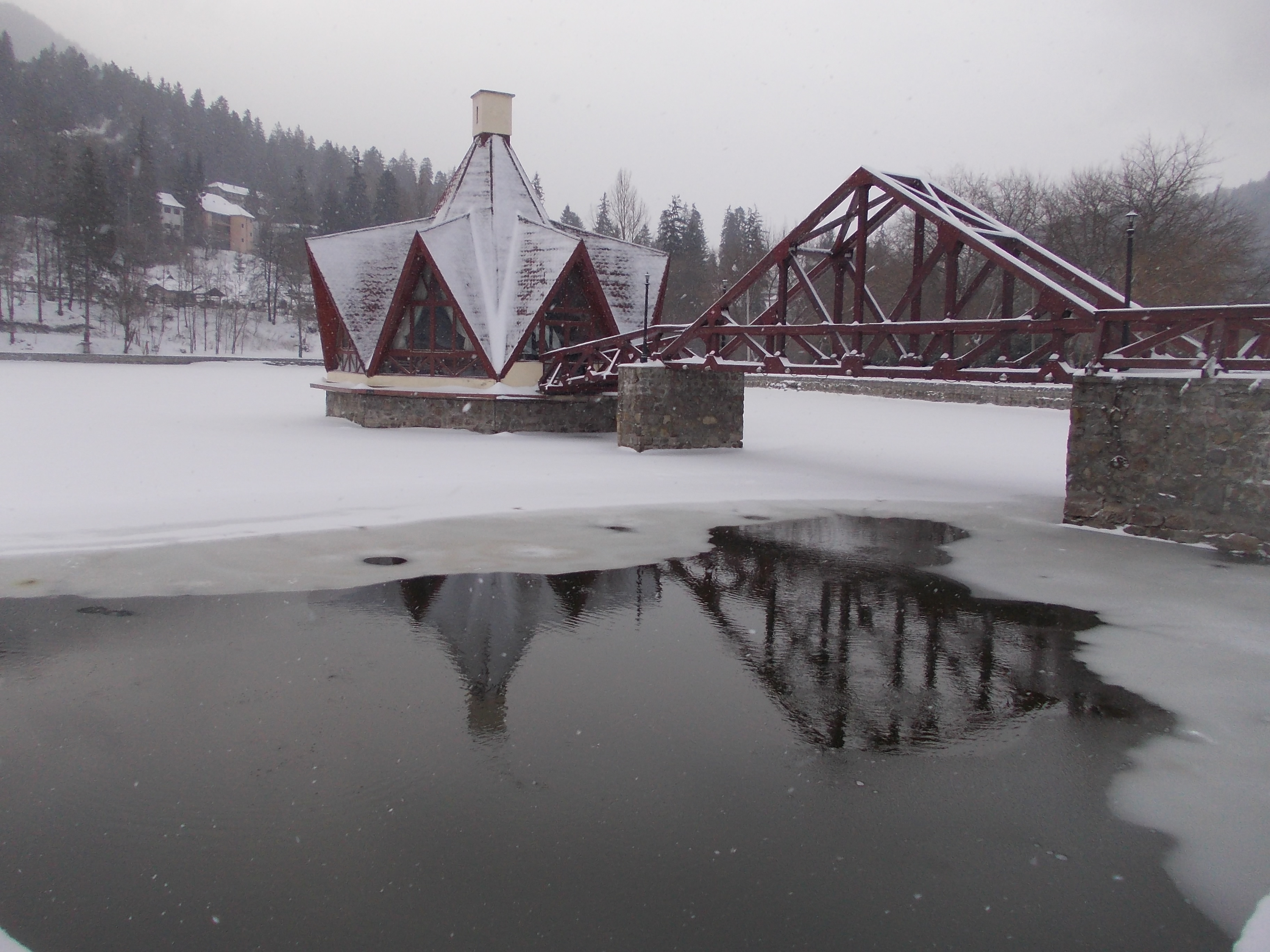 Pavilionul de pe lacul Ciucaş